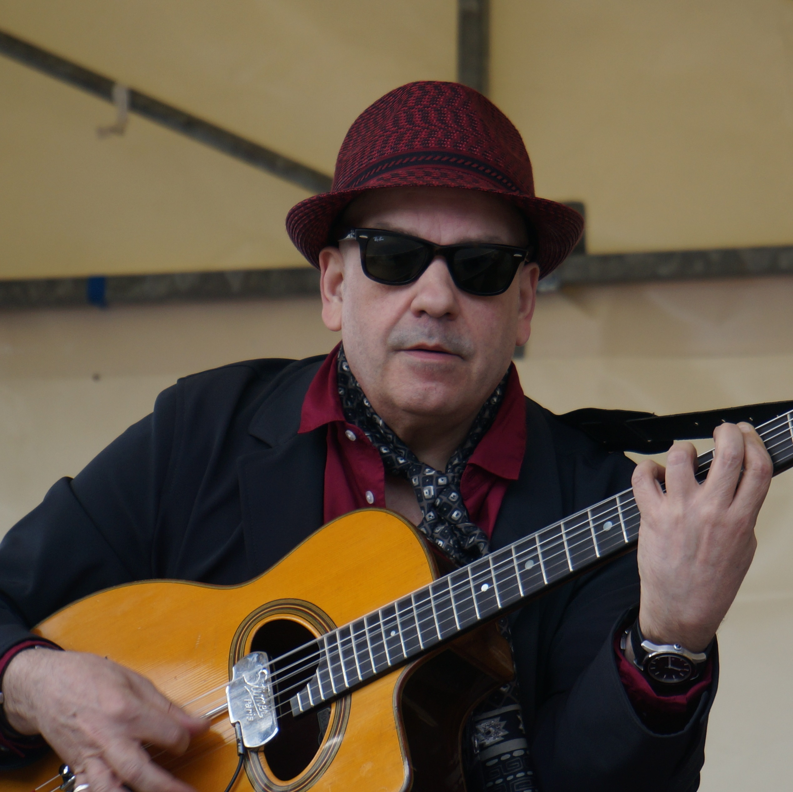 lors de "Flâneries musicales " de 2015.